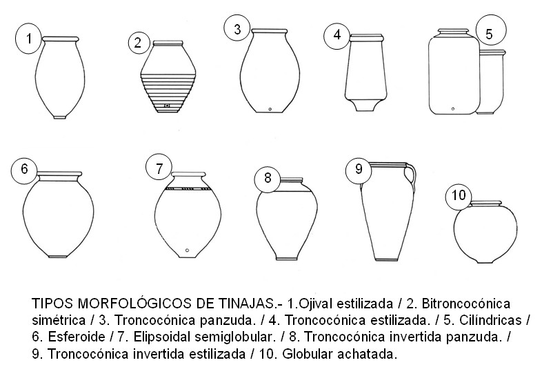 Diez tipos morfolóligicos de tinaja.Tinajería española de origen romano y musulmán.